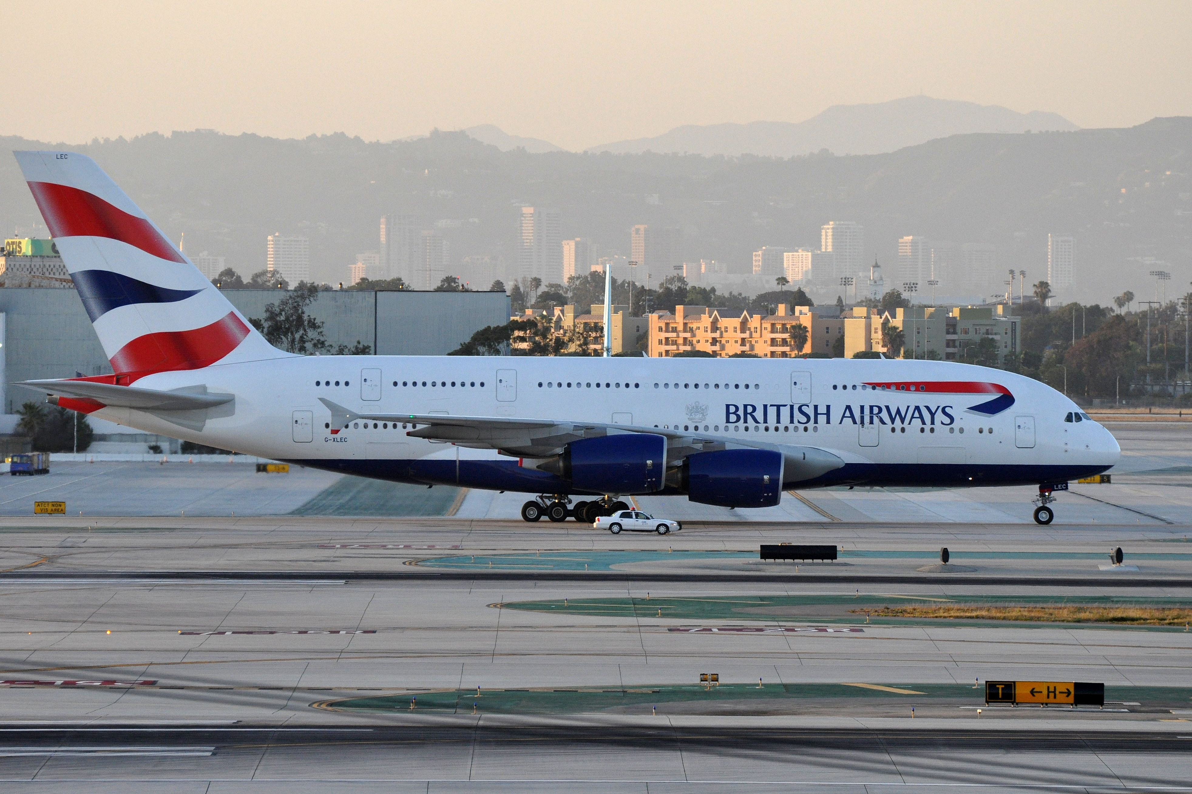 MSN 124 A380-841 BRITISH AIRWAYS LAX AIRPORT